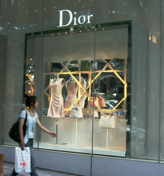 Dior_Omotesando Store